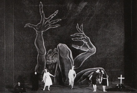 Fotografi as scenuppsättningen av Dårhuset på Théatre des Champs-Elysées år 1921. I bilden Jean Börlin och Jolanda Figoni framför dekor av Nils Dardel.